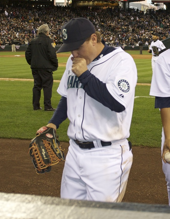 Brad Wilkerson in 2008